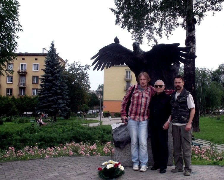 Sergiusz Papliński "Kawka" (w środku) przy pomniku WIN w Radomiu.